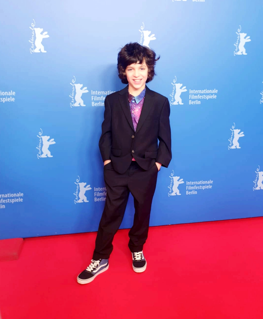 Giuseppe Bonvissuto auf der Berlinale 2020Depicted person: Giuseppe Bonvissuto